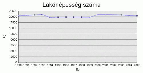 A kép Paks város lakósságszámának alakulását mutatja be.